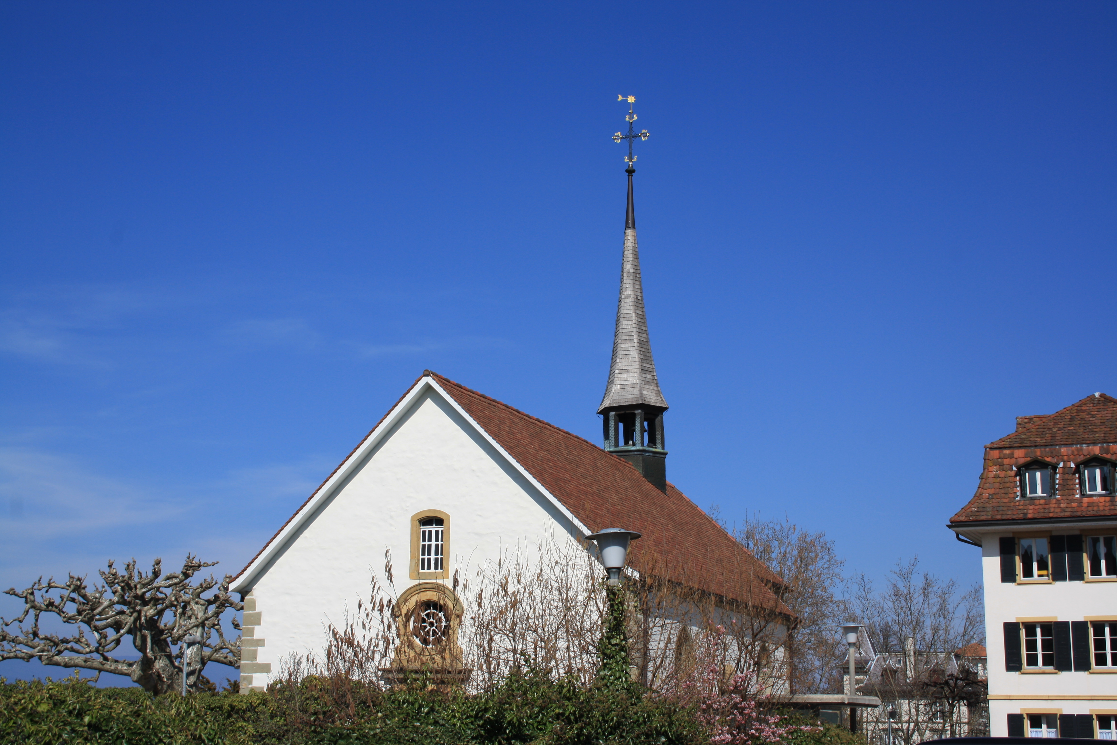 Französische Kirche in Murten